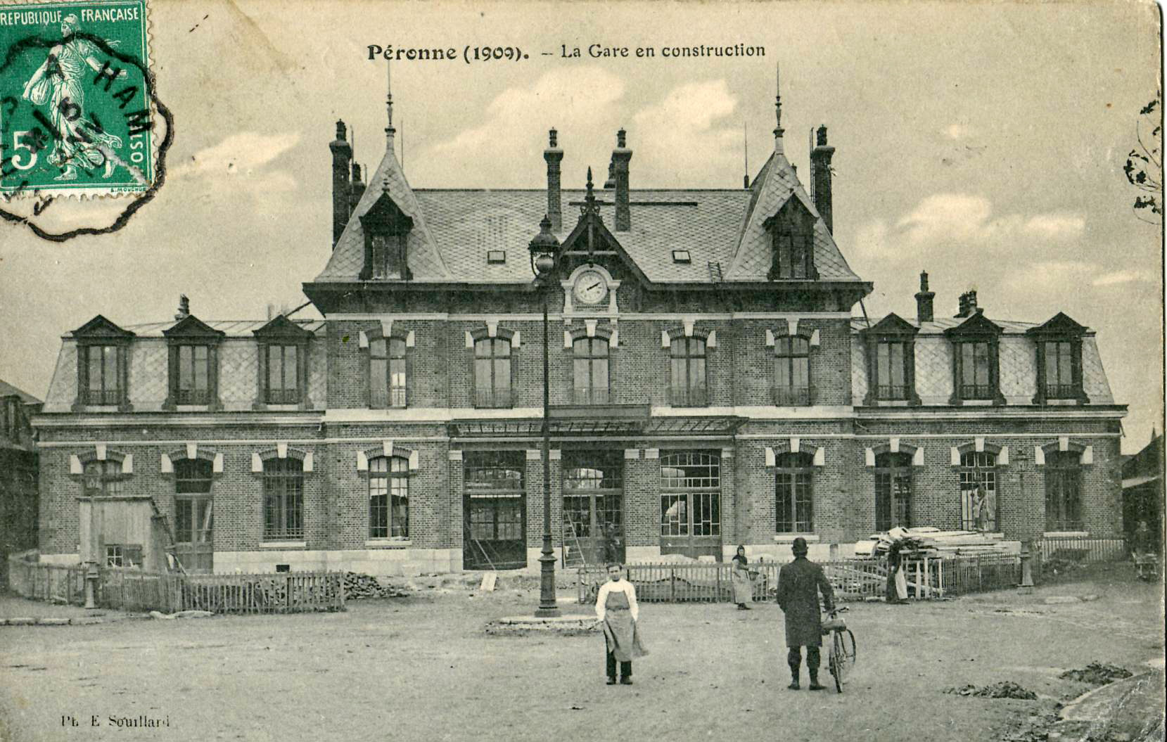 Carte postale ancienne éditée par E. Souillard :PÉRONNE (1909) - La Gare en constructionCachet d'oblitération d'ambulant postal du 5 janvier 1910, ligne ??? à Ham